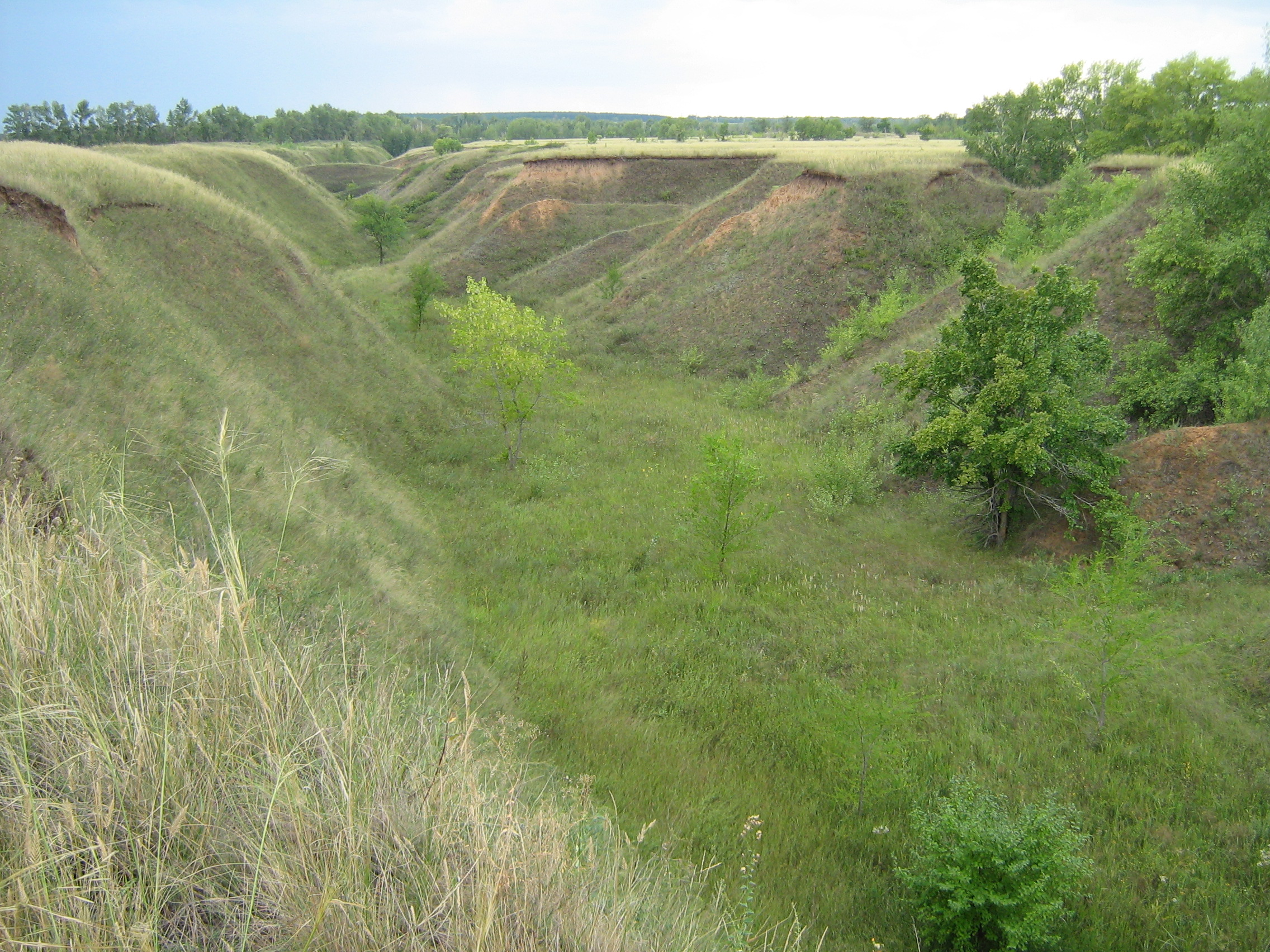 Сухореченский Коралл